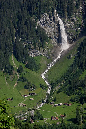 Stäubifall (Äsch) gesehen vom Klausenpass